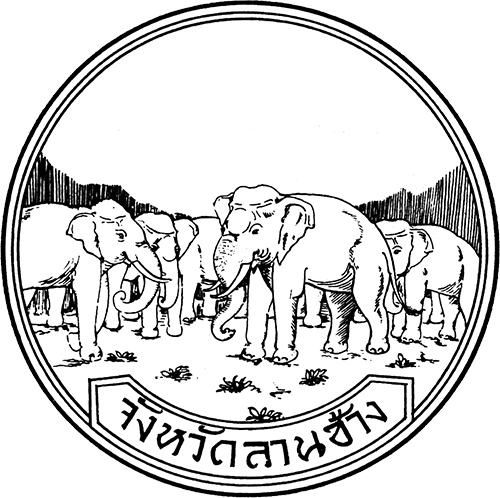 ตราประจำจังหวัดลานช้าง สมัยขึ้นกับการปกครองของไทย พ.ศ. 2484 - 2489 ภาพจากหนังสือตราประจำจังหวัด กรมศิลปากรจัดพิมพ์ พ.ศ. 2542